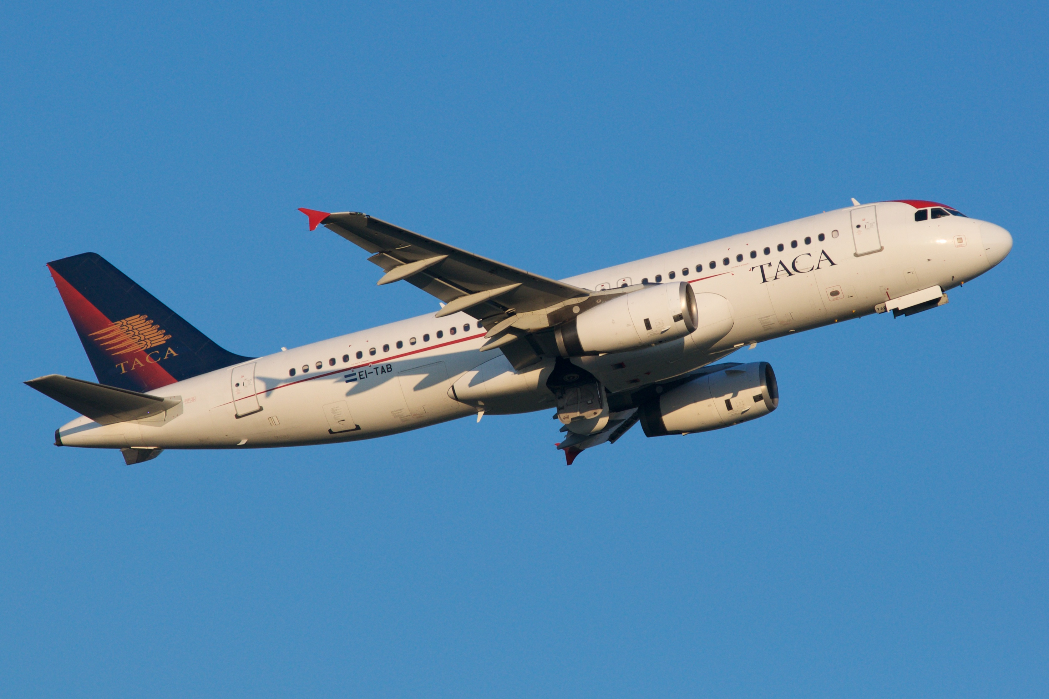 Departing YYZ